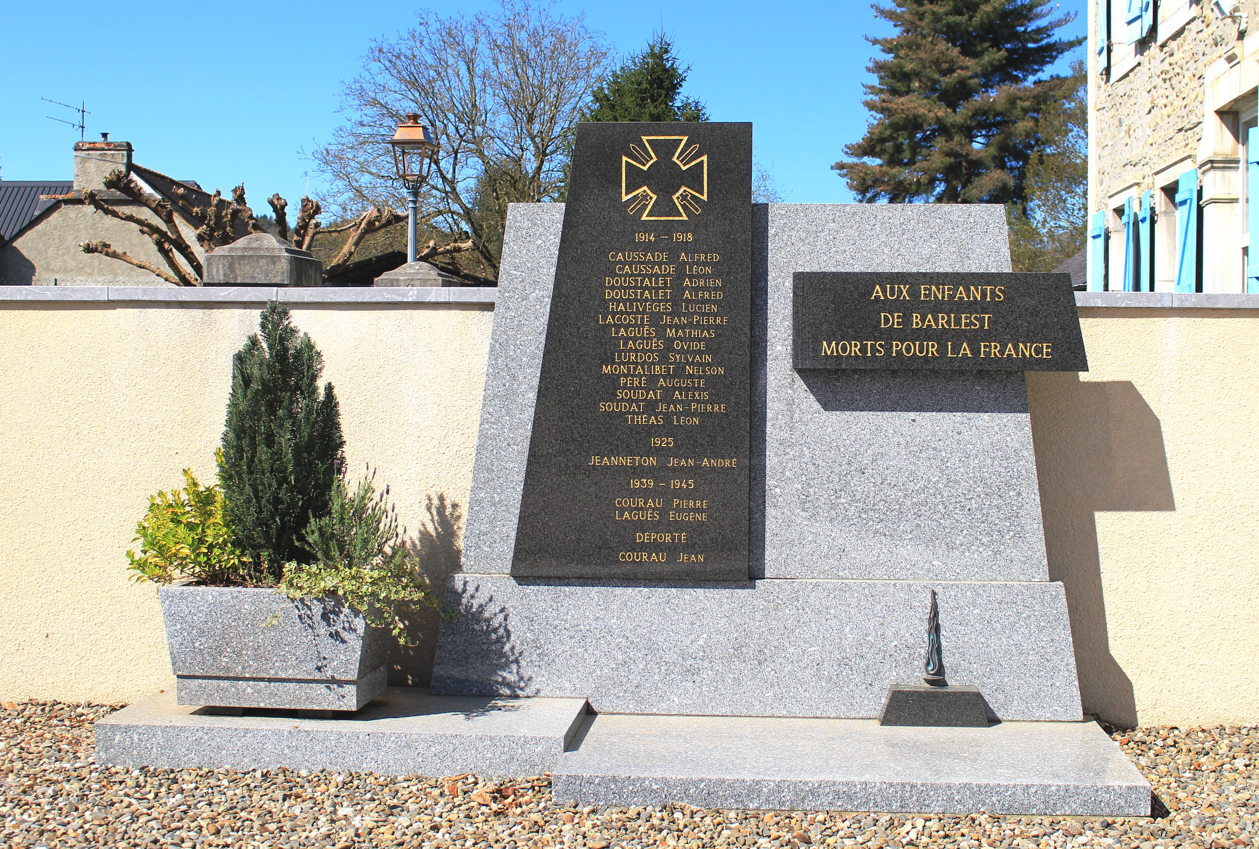 Monument aux morts de Barlest (Hautes-Pyrénées)